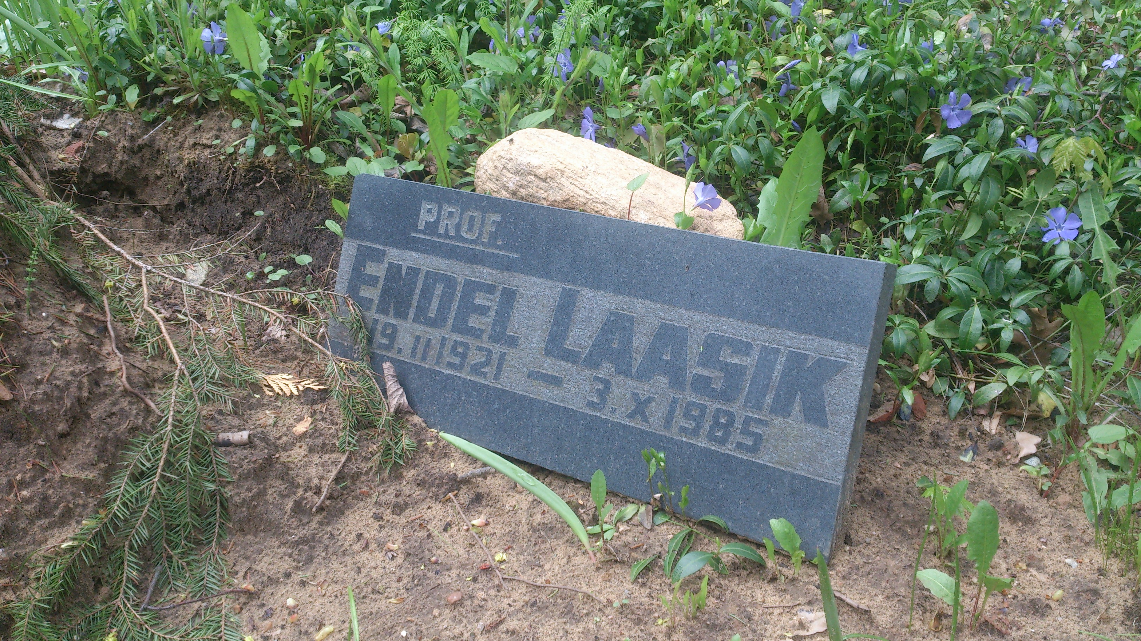 Endel Laasiku haud, Vana-Jaani kalmistu